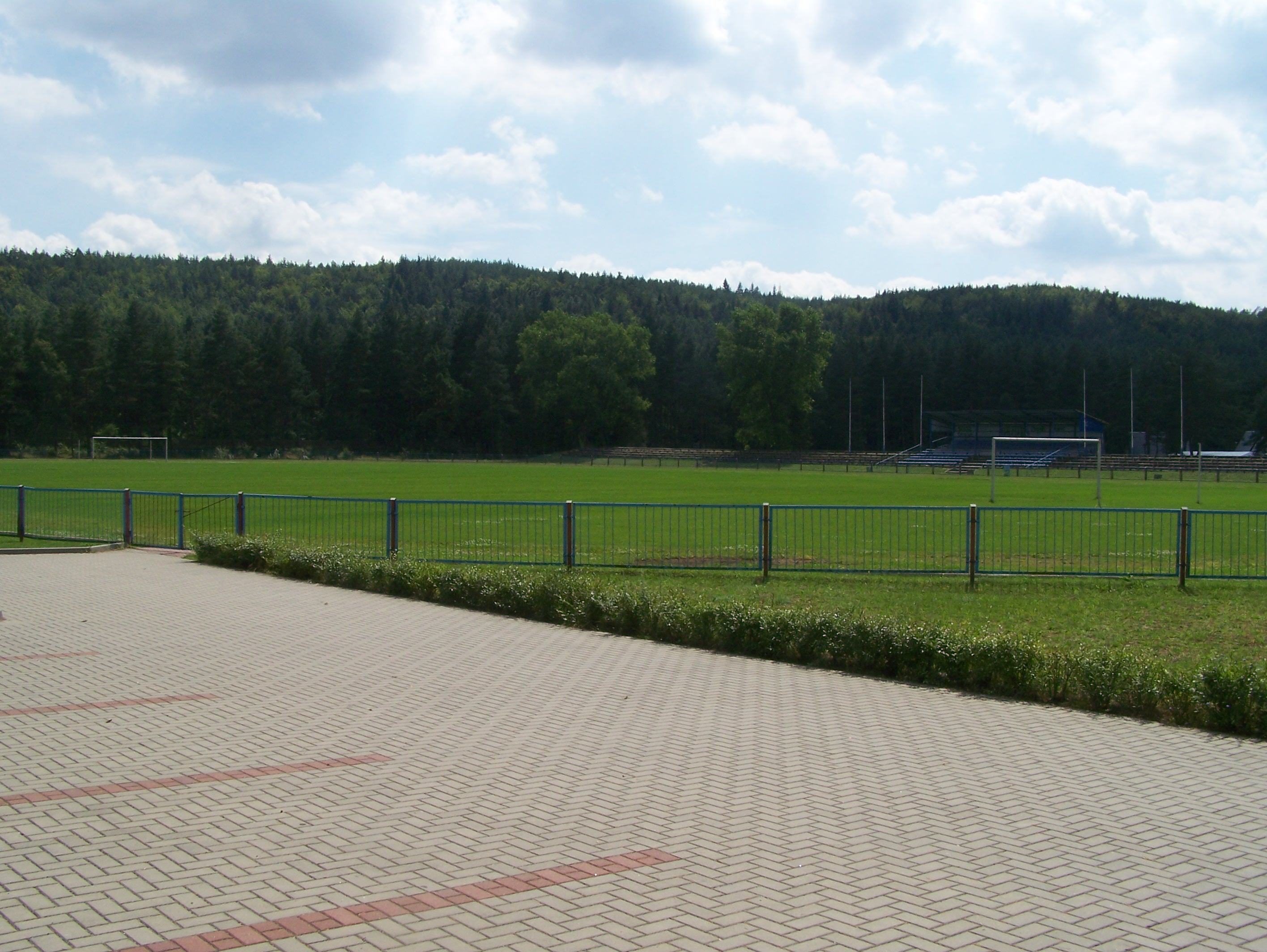 Stadion Pogoni Lębork. W tle szatnie.